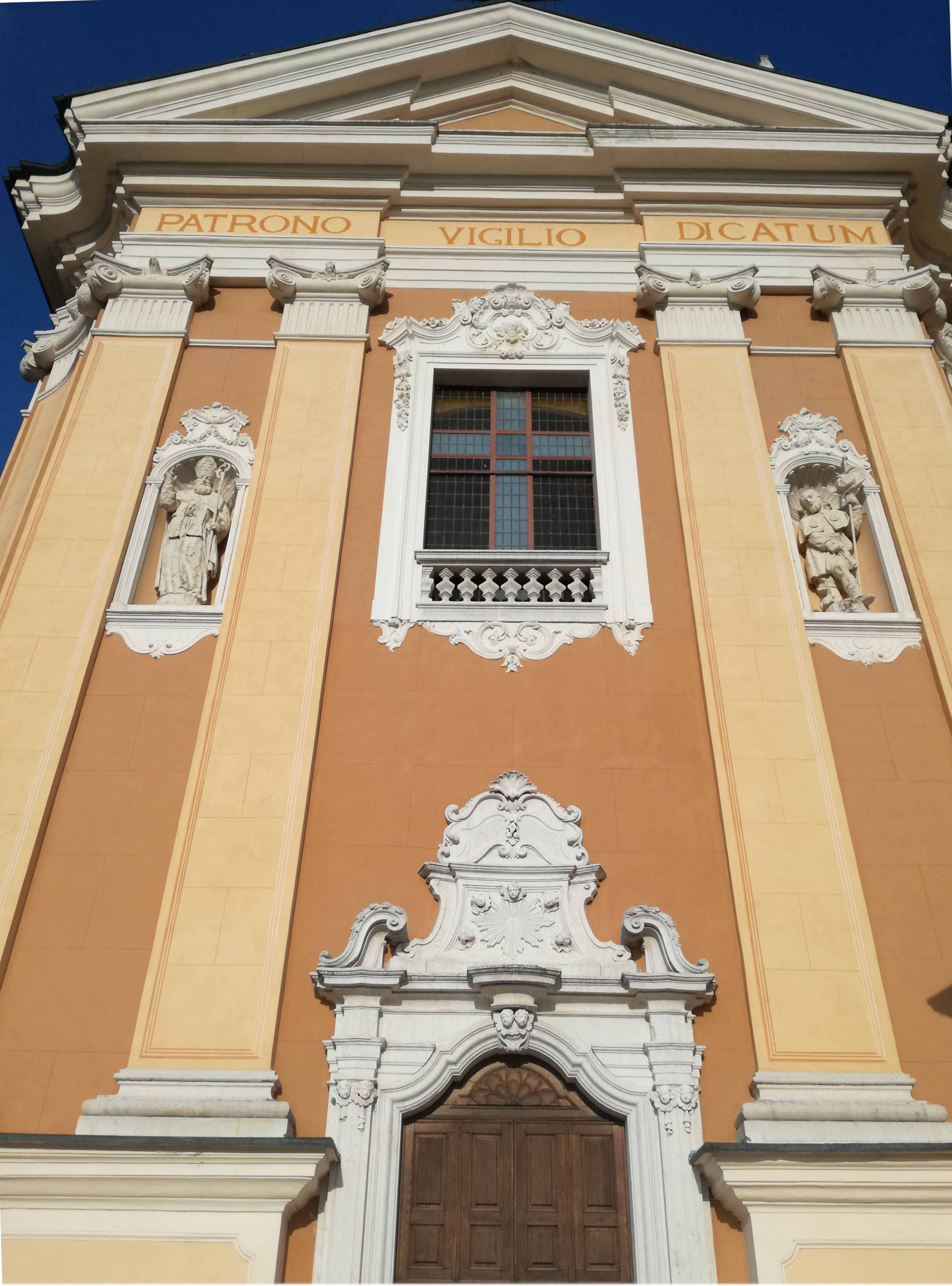 Facciata della Chiesa di San Vigilio, Lodrino (BS), Italia